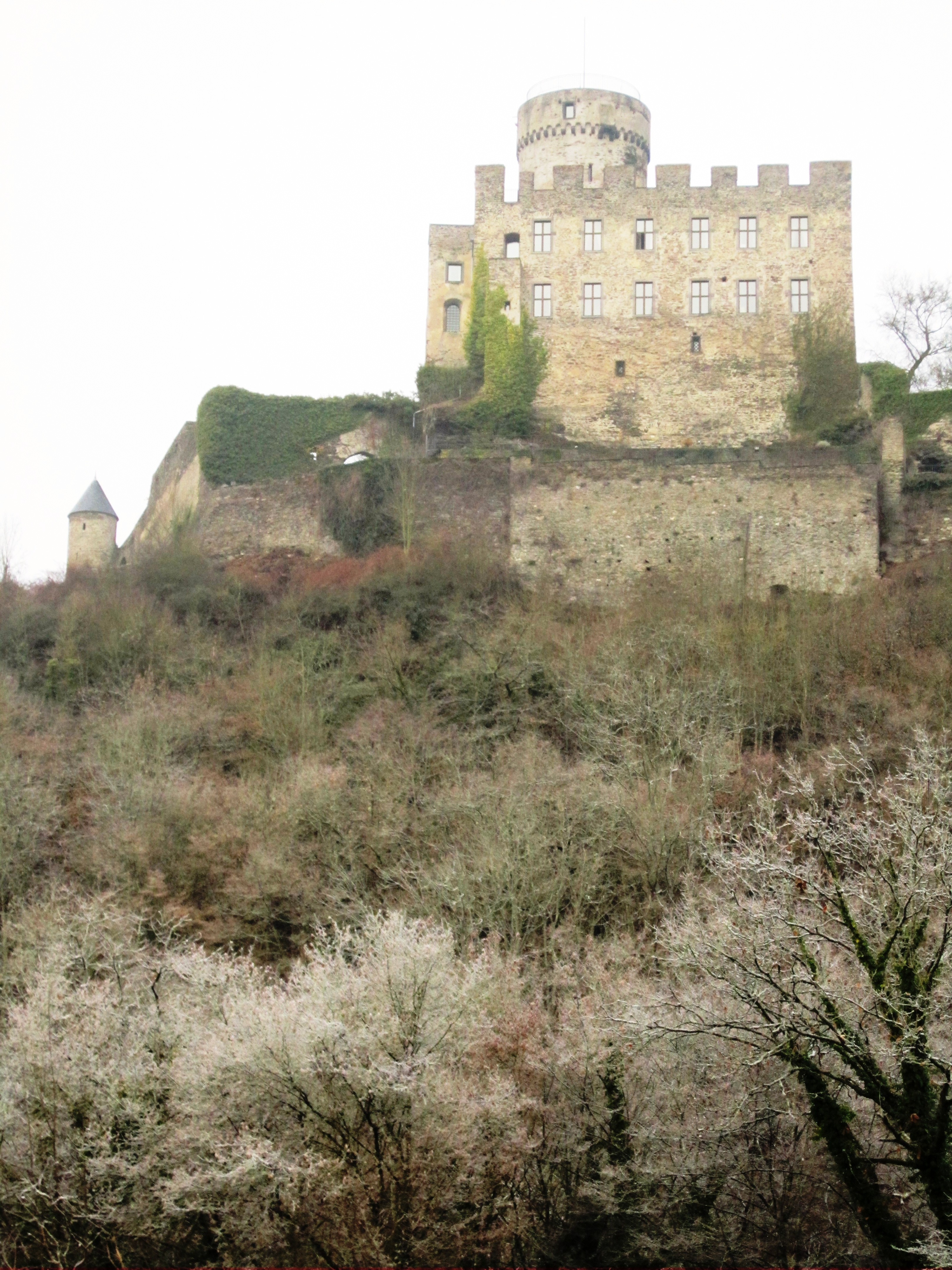 Kasteel Pyrmont - Roes - Rijnland-Palts - Duitsland